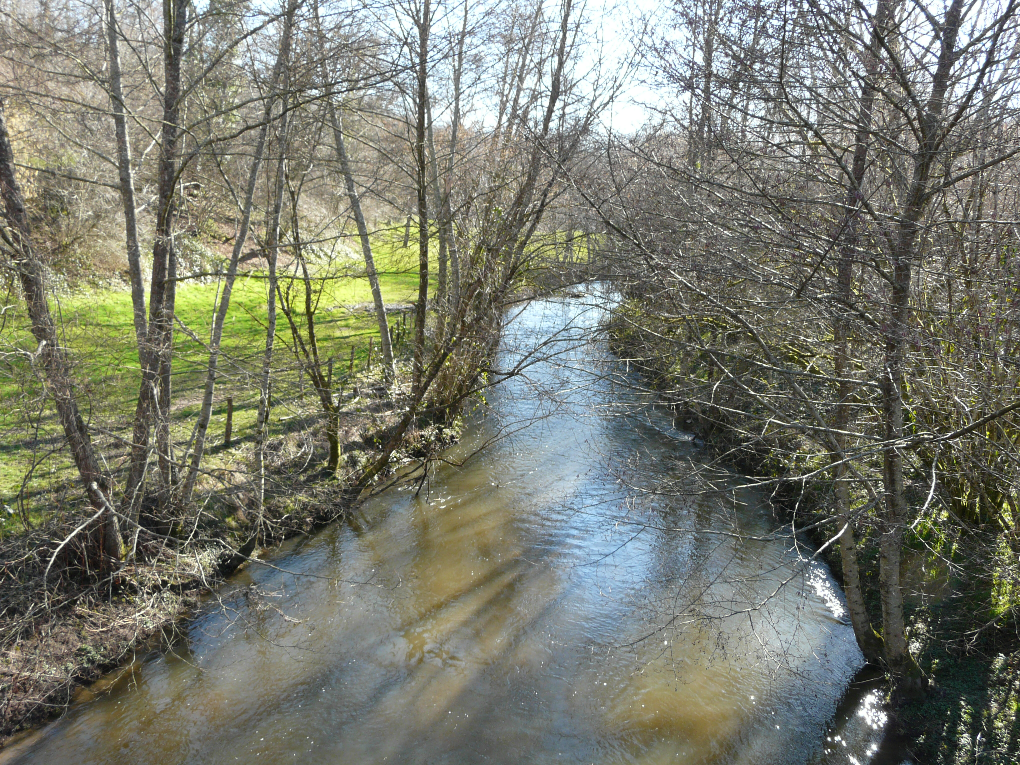 En aval de la route départementale 81, la Loue marque la limite entre Lanouaille (à gauche) et Sarlande (à droite), Dordogne, France.